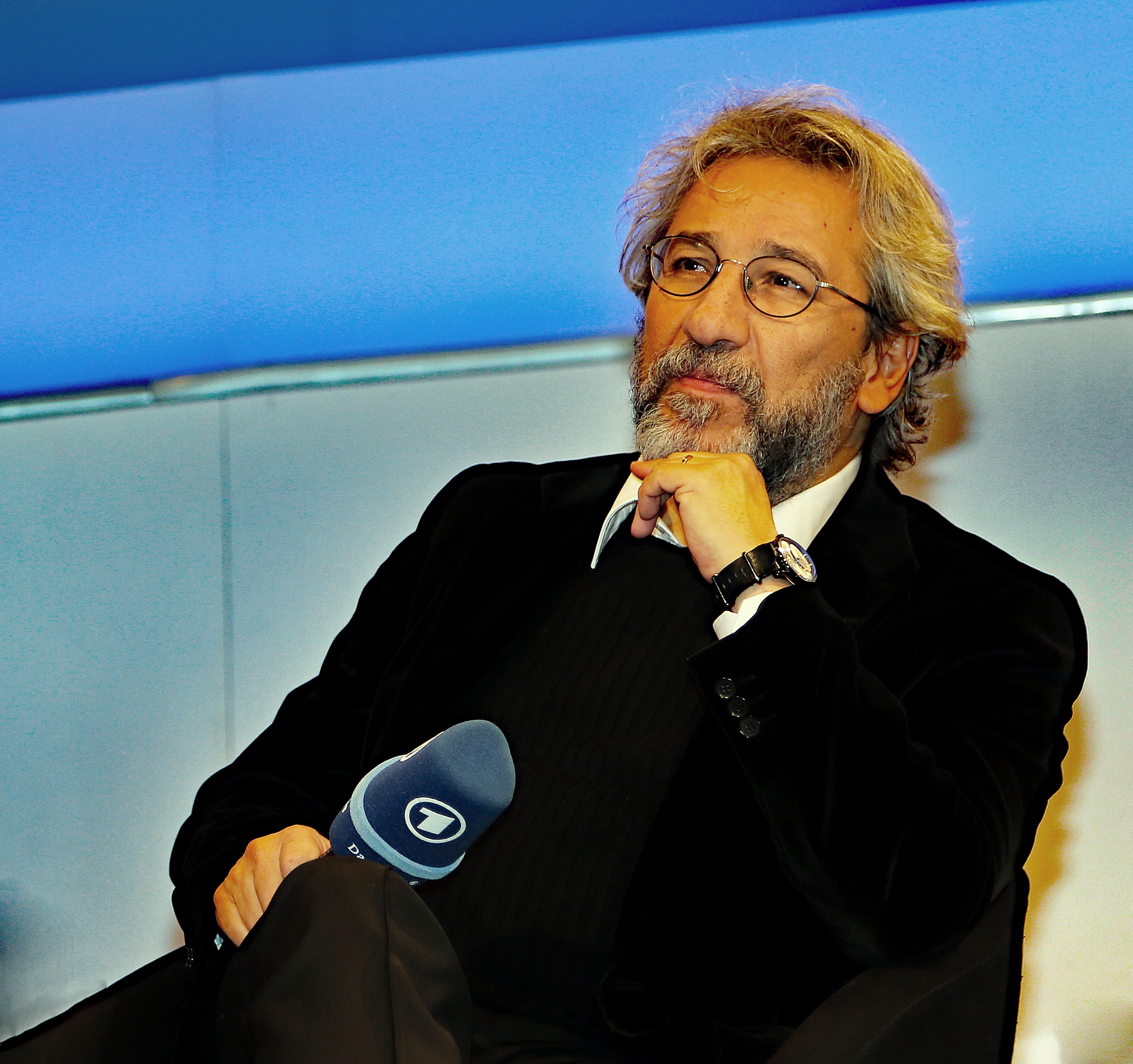 Can Dündar bei der Frankfurter Buchmesse 2016